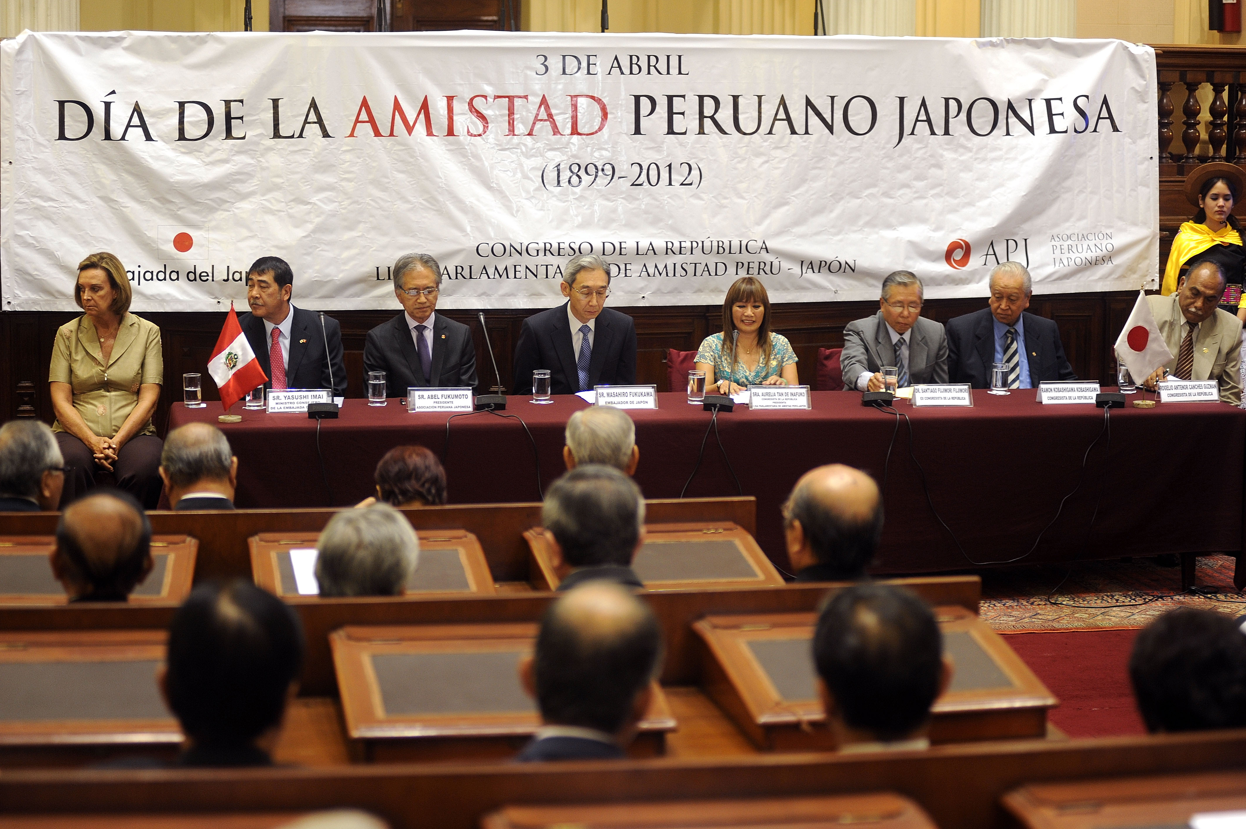 El Día de la Amistad Perú-Japón y el 113° aniversario de la Inmigración japonesa al Perú fue celebrado hoy con un acto especial en el Congreso de la República. Fue organizado por el despacho de la congresista Aurelia Tan de Inafuko y asistieron también otros legisladores y ex parlamentarios. Igualmente, acudió el embajador japonés en el Perú, Masahiro Fukukawa.